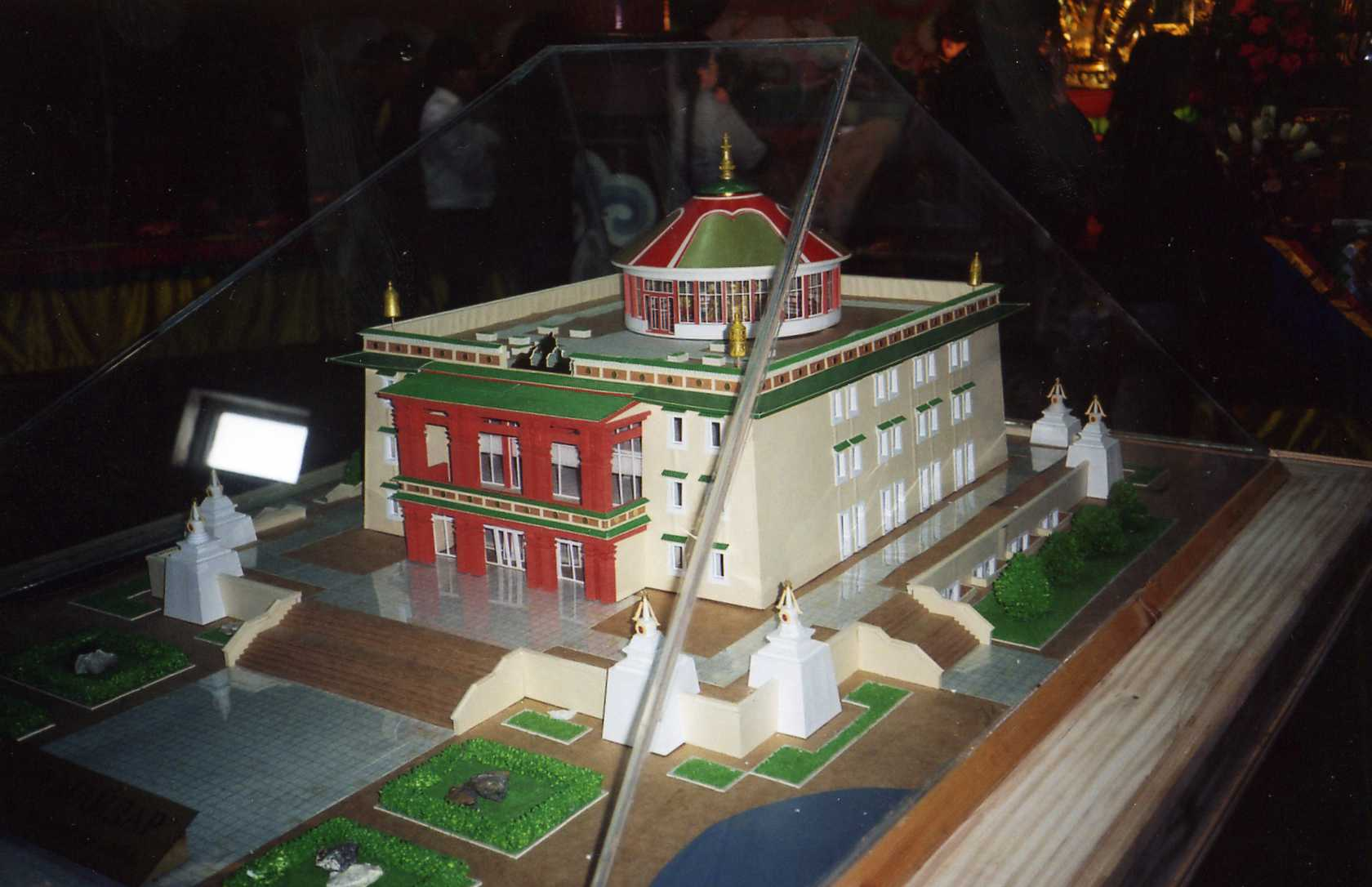 Maitreya Temple